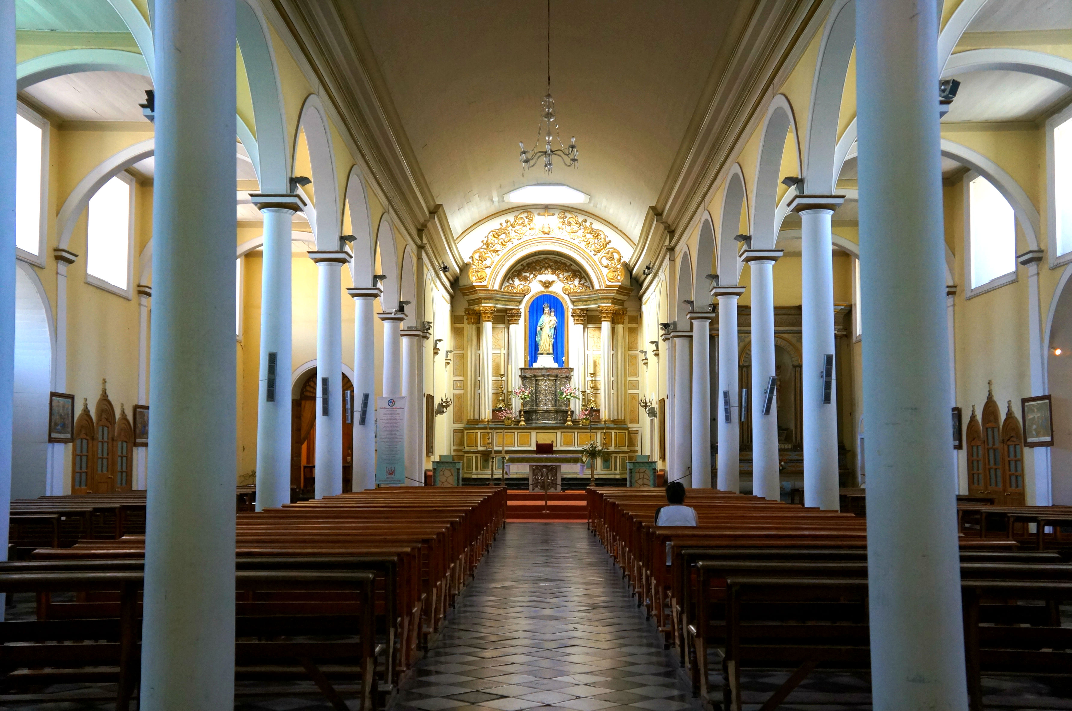 Catedral de Copiapó. This is a photo of a national monument in Chile: 557